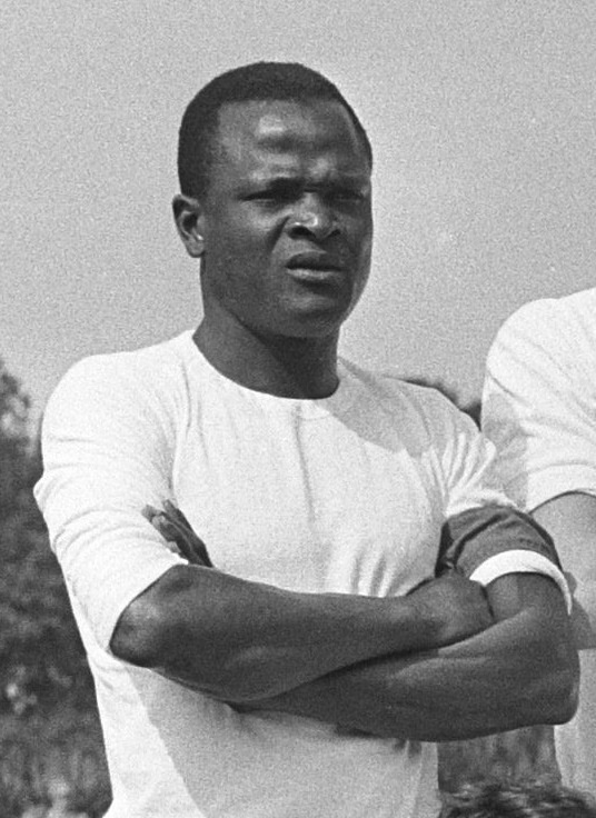 Erwin Sparendam in 1968